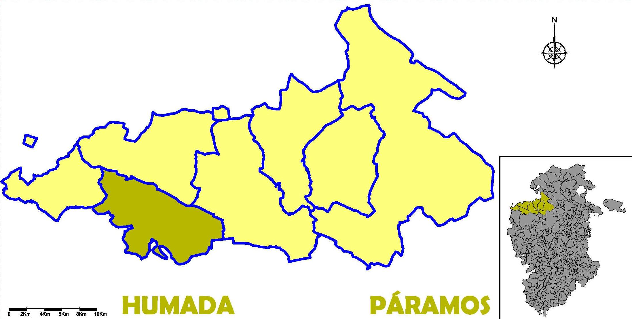 Situación del municipio de Humada en la comarca de Páramos, provincia de Burgos